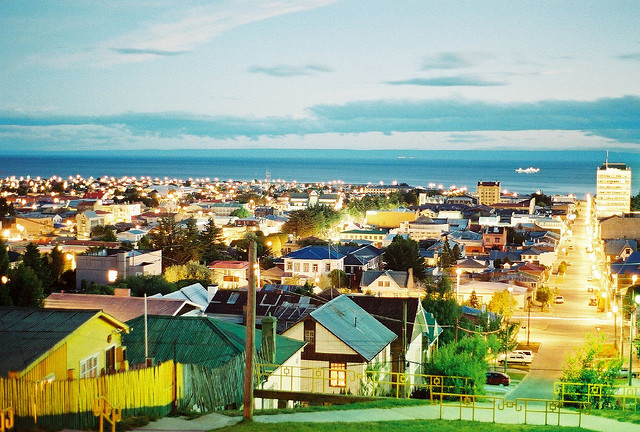 Punta Arenas de noche, estrecho de magallanes en el fondo.